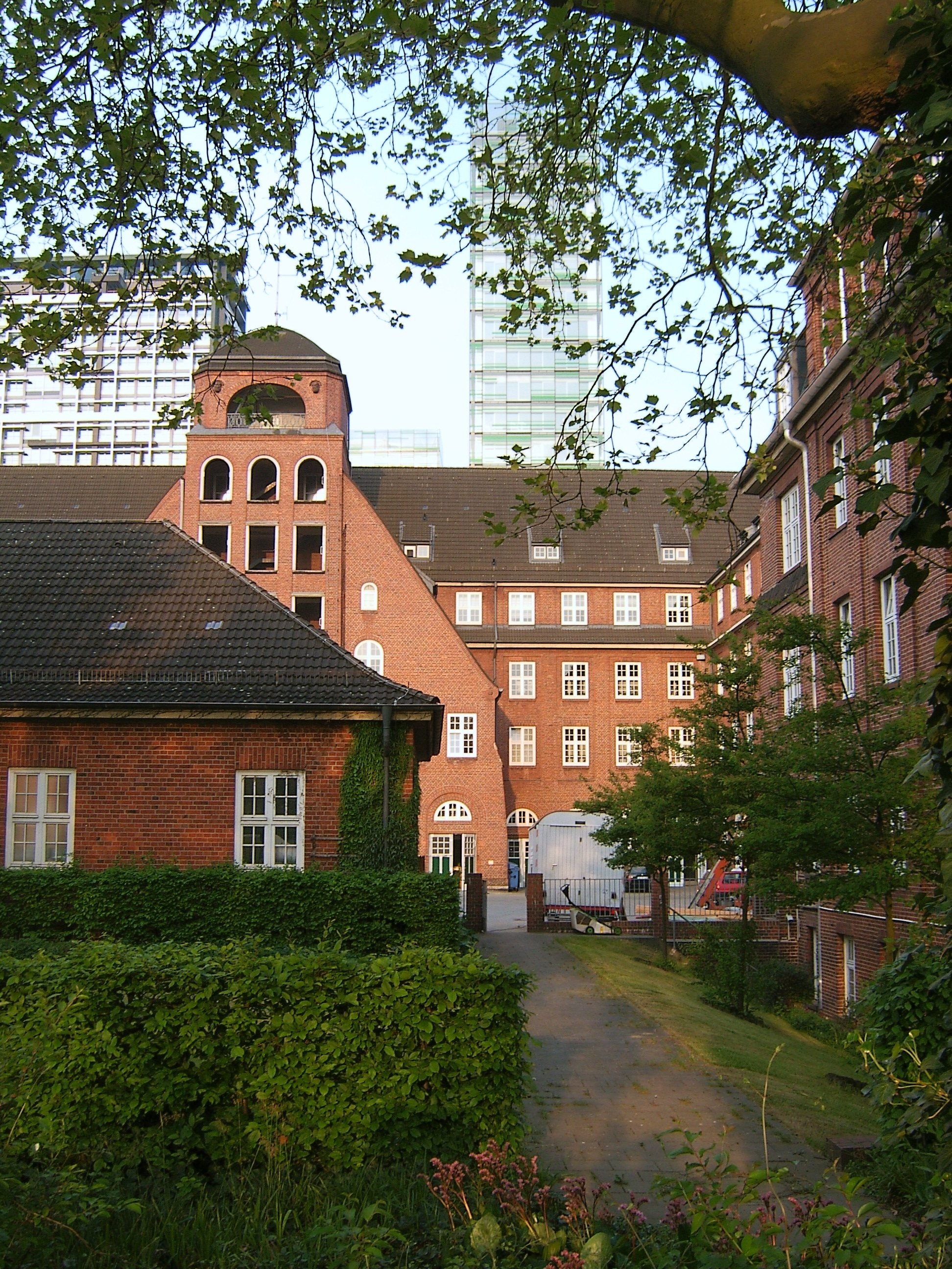 Innenhof mit Übungsturm der Hauptfeuerwache am Berliner Tor in St. Georg. Die Wache wurde von Fritz Schumacher errichtet. This is a photograph of an architectural monument.